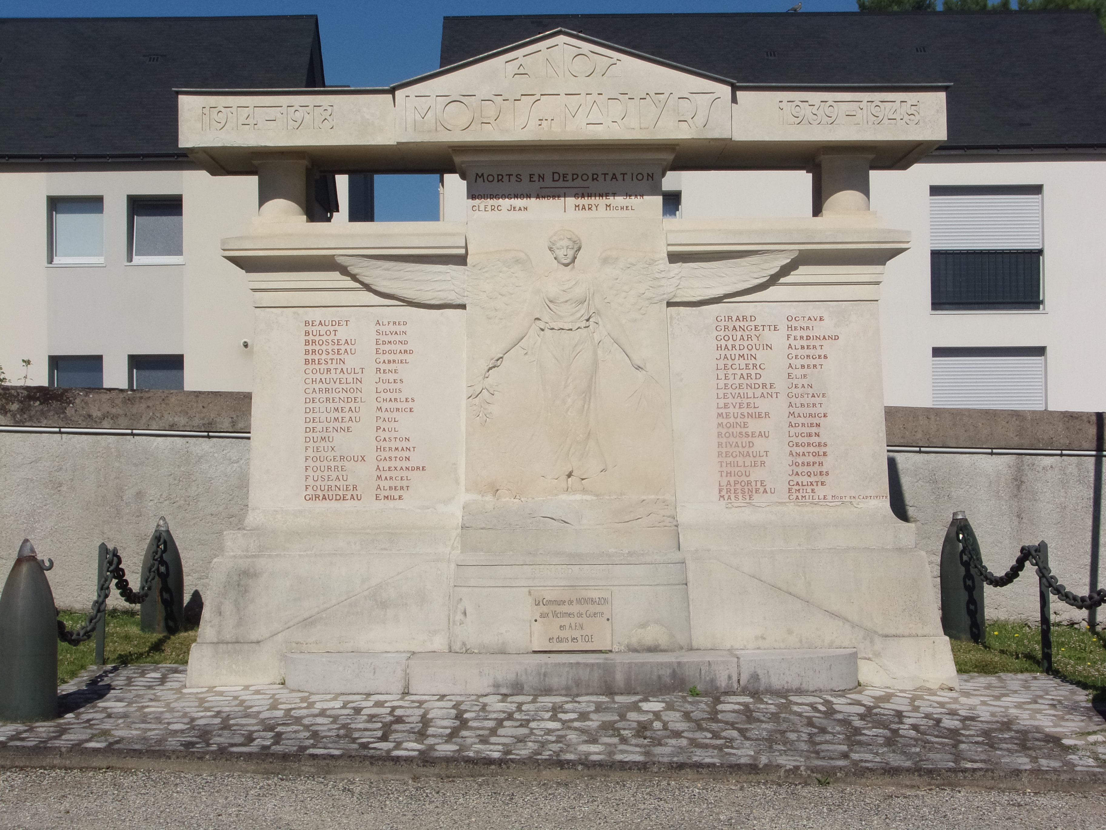 Monument aux morts au cimetière de Montbazon